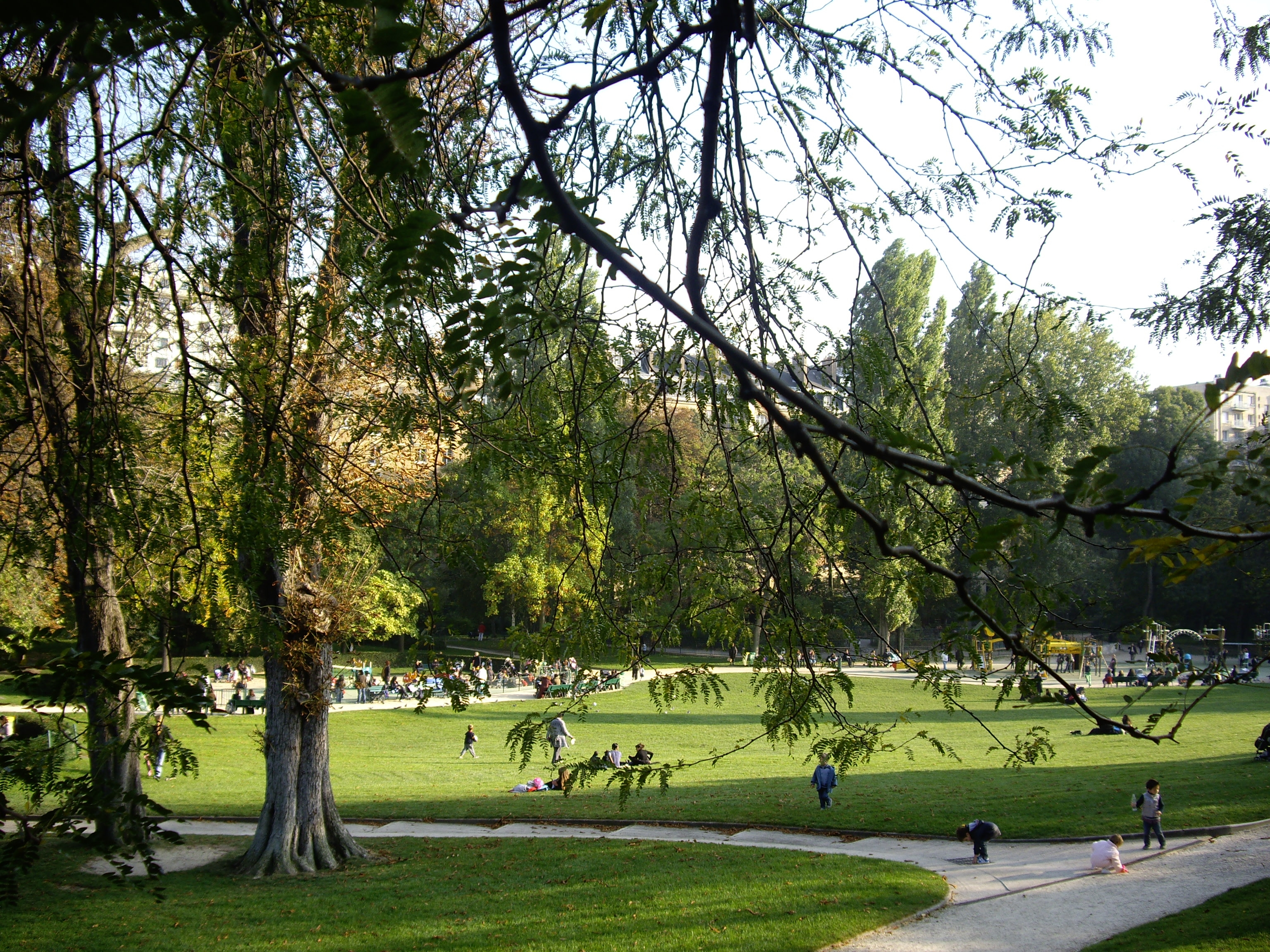 Parc Sainte-Périne, Paris 16e.